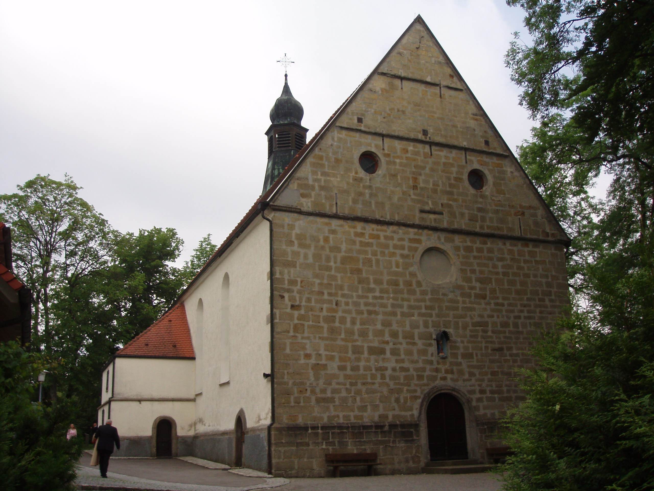 Wallfahrtskapelle Palmbühl bei Schömberg